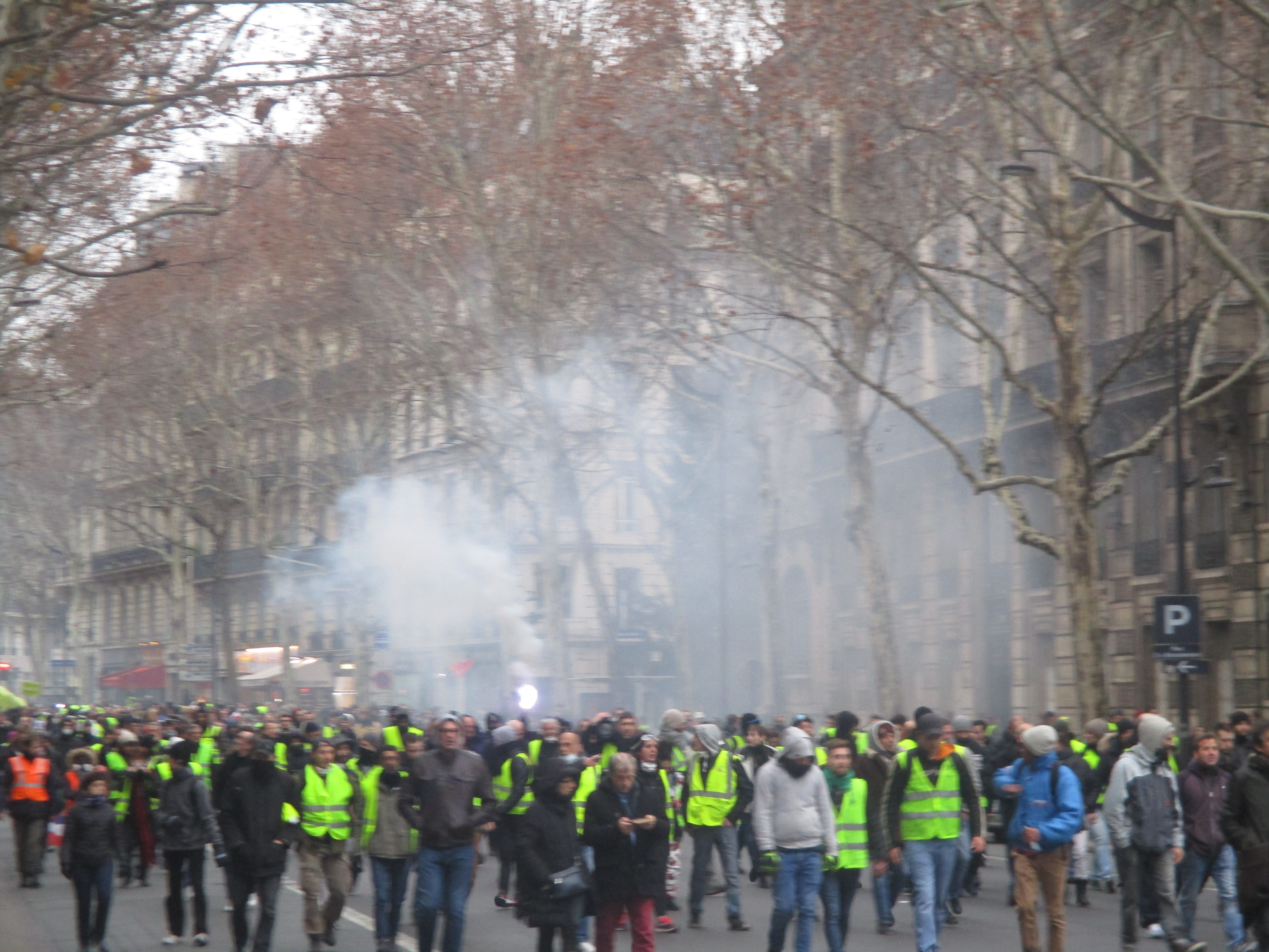 Samedi 5 janvier 2019 après-midi. Les gilets jaunes continuent d'arriver au début du boulevard Saint-Germain.